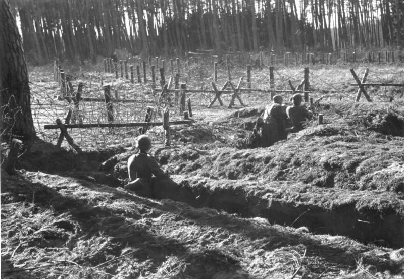 Bei Scheighofen an der Lauter, 4 km ostw. Weissenburg. 2.3.40 Westwall.- LMG-Stellung im Bienwald, Laufgraben und Drahtverhau. Heeresfilmstelle, Bildberichter: Lohmeyer.